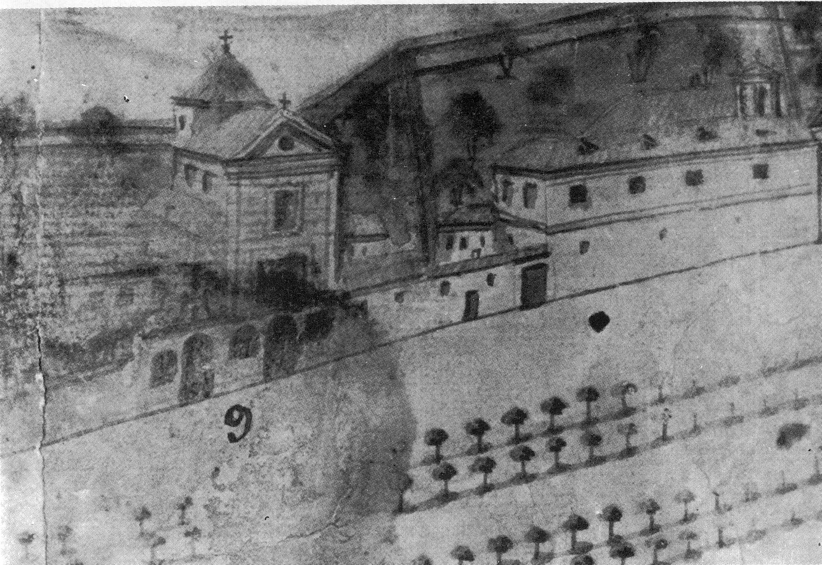 Convento de San José de Padres Capuchinos según el plano de Diego Pérez de 1788, ((Valladolid)